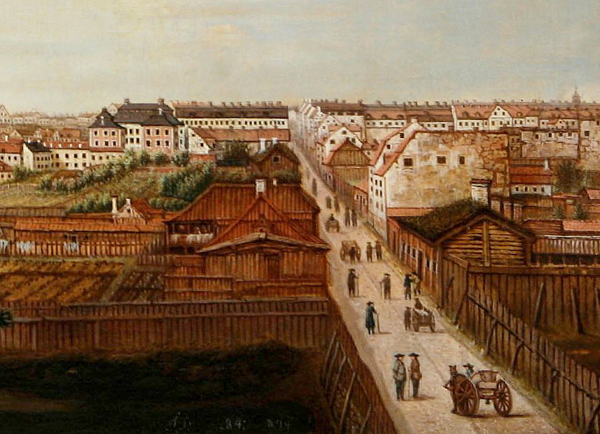 Utsikt österut från Blekholmen mot Gamla Brogatan (del av större tavla)